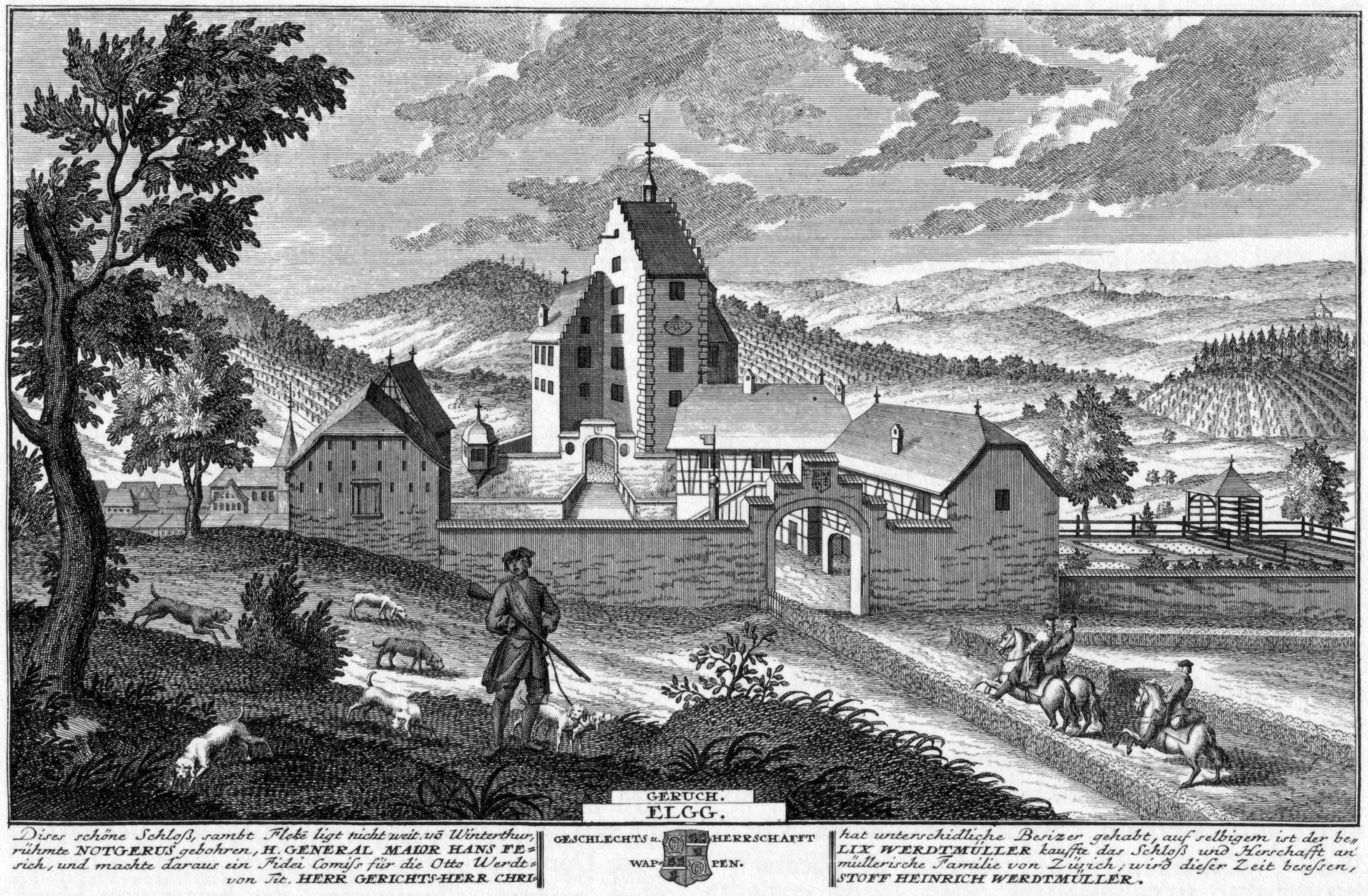 Das Schloss Elgg ca. 1742. Stich von David Herrliberger. Erschienen in Eigentliche Vorstellung der Adelichen Schlösser im Zürich Gebieth, Nr. 3, 1742